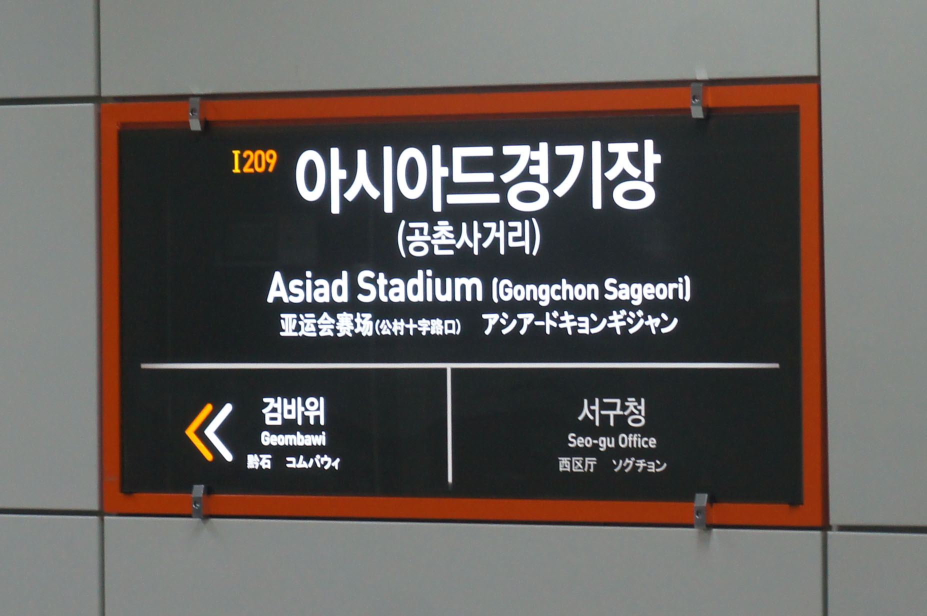 서부여성회관역 역명판